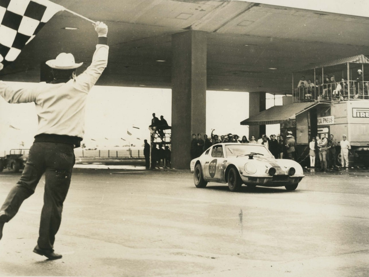 Fotografia do Fundo Correio da Manhã, sob a guarda do Arquivo Nacional.